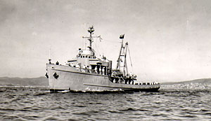 PP 60 Lientur